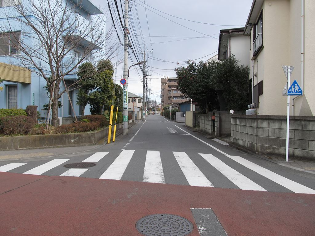 人見街道終点。東京都府中市若松町４丁目